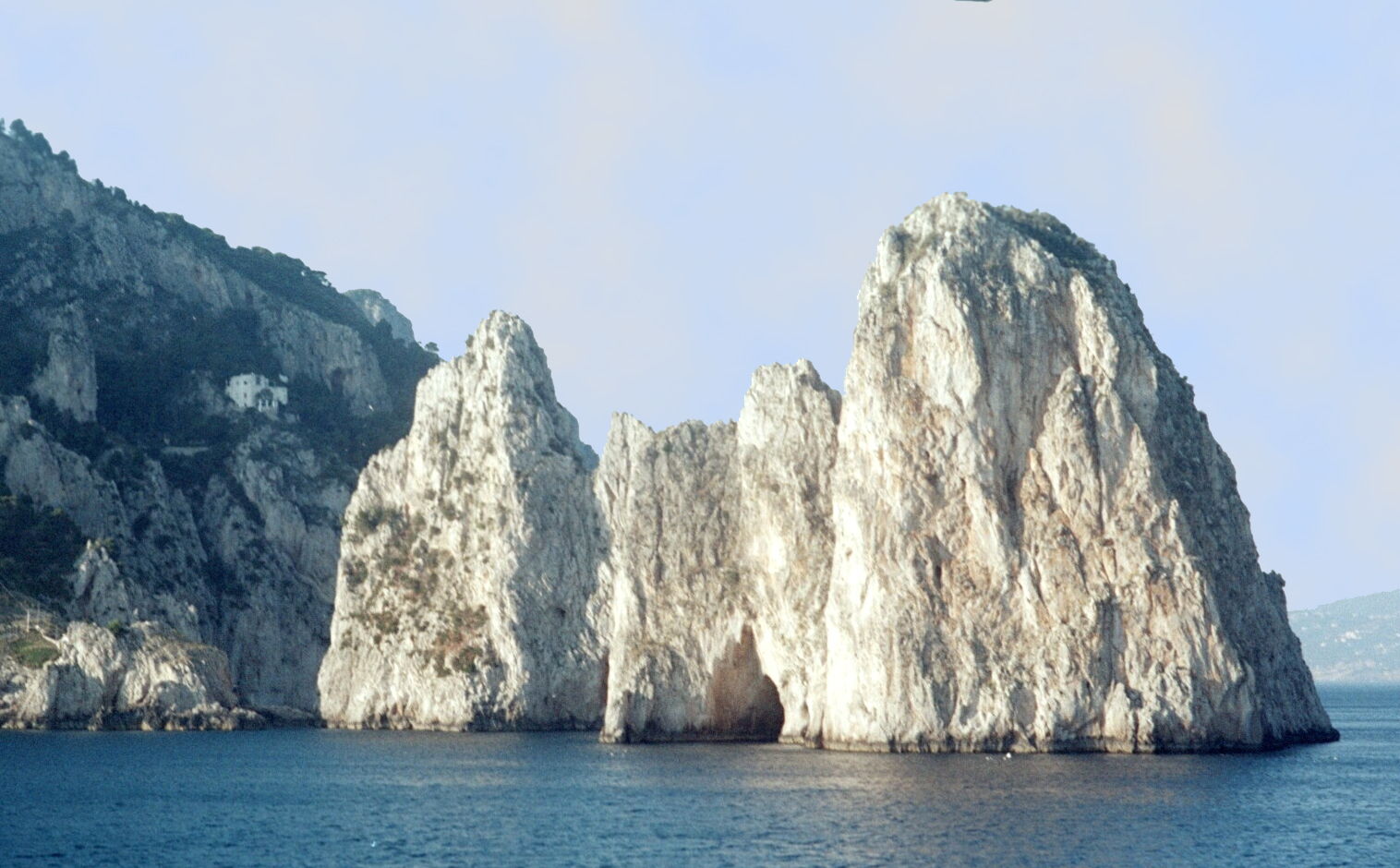 De Fielsgrupp Faraglioni .